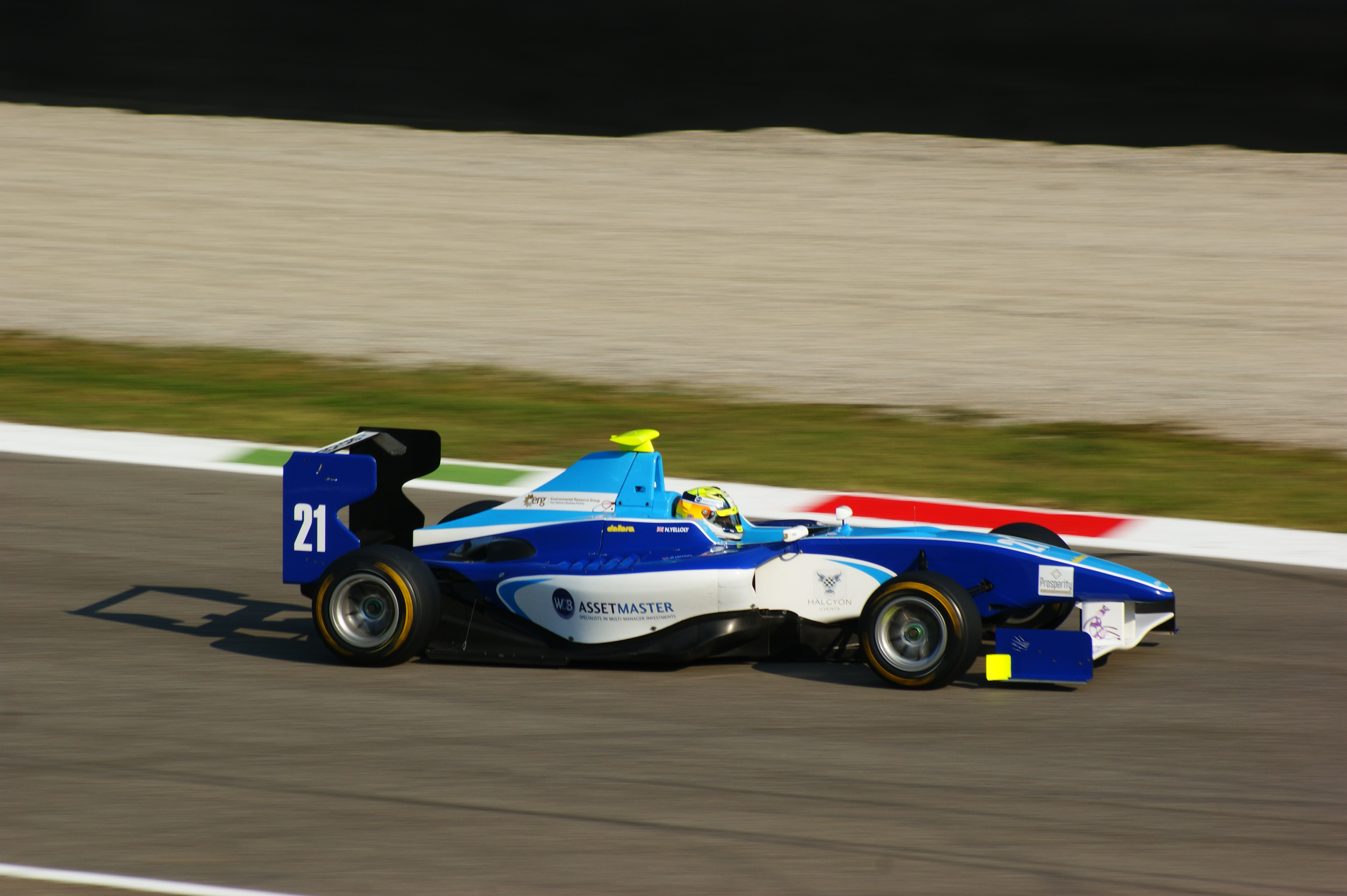 Nick Yelloly alla variante Ascari Monza 2011